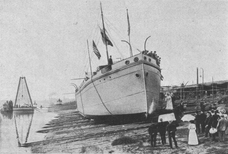 Stapellauf eines seegehenden Tankschiffes auf der Werft Christof Ruthof in Mainz-Kastel im Jahr 1902.